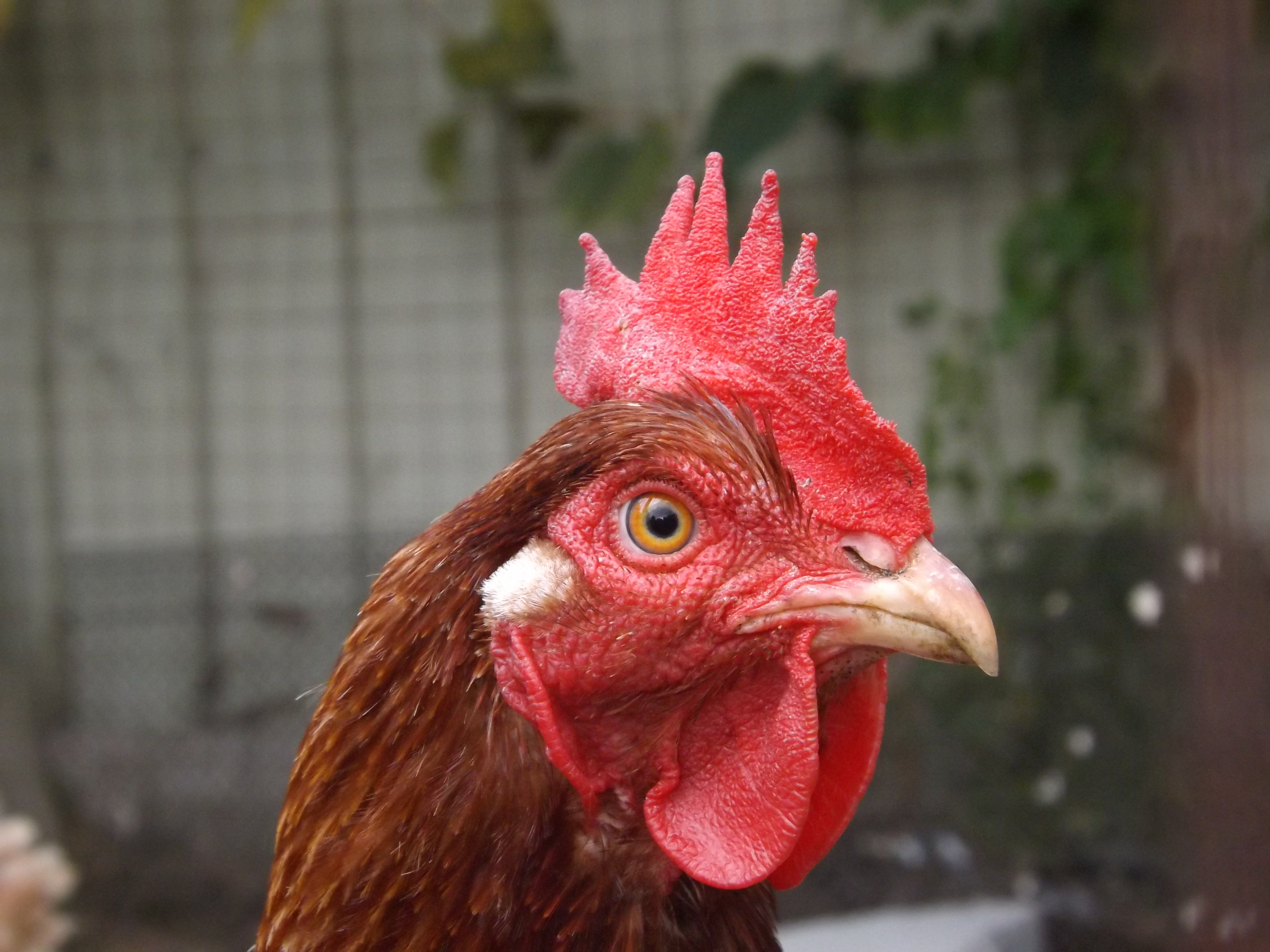 Détail de la tète d'une poule